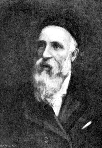 Lars Bratt (1824-1898). Svart kalott, svartprickig vid halsduk, svart dräkt, mörkröd fond.